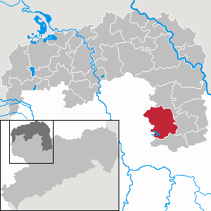 Wermsdorf in Saxony - Landkreis Nordsachsen